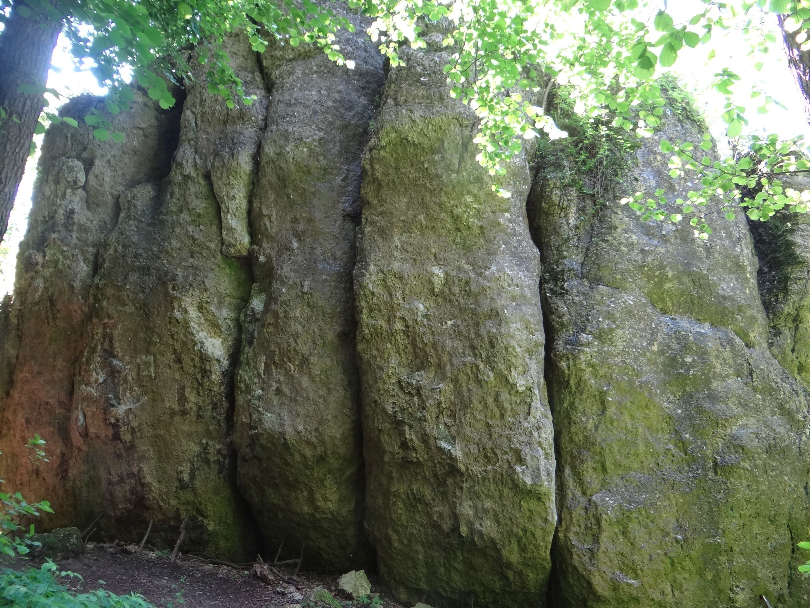 Węzia Skała w Dolinie Brzoskwini